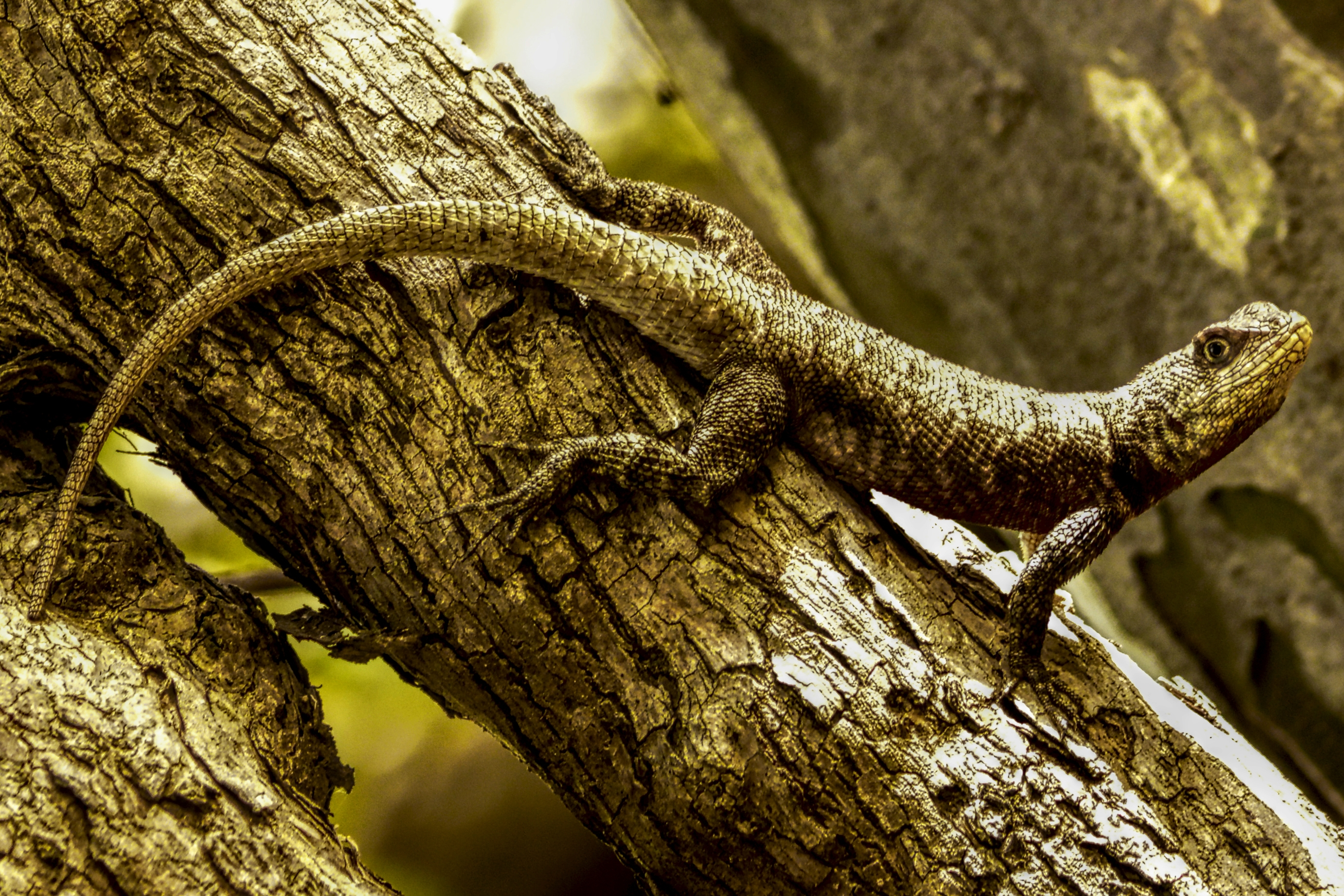 Nome científico: Tropidurus oreadicus